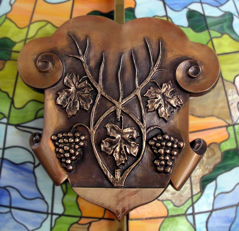 Uzhhorod, Ukraine, Coat of arms, relief sculpture in new train station building author: Elke Wetzig (elya) date: 2004-10-18 Wappen von Uschhorod, Ukraine Autorin: Elke Wetzig Relief im neuen Bahnhofsgebäude von Uschhorod Aufnahmedatum: 18. 10. 2004